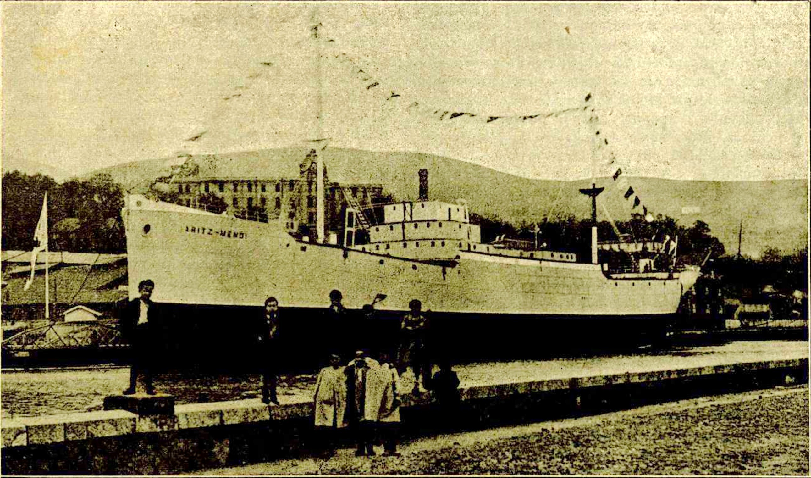 El vapor Aritz Mendi construït a les drassanes Euskalduna (Bilbao)